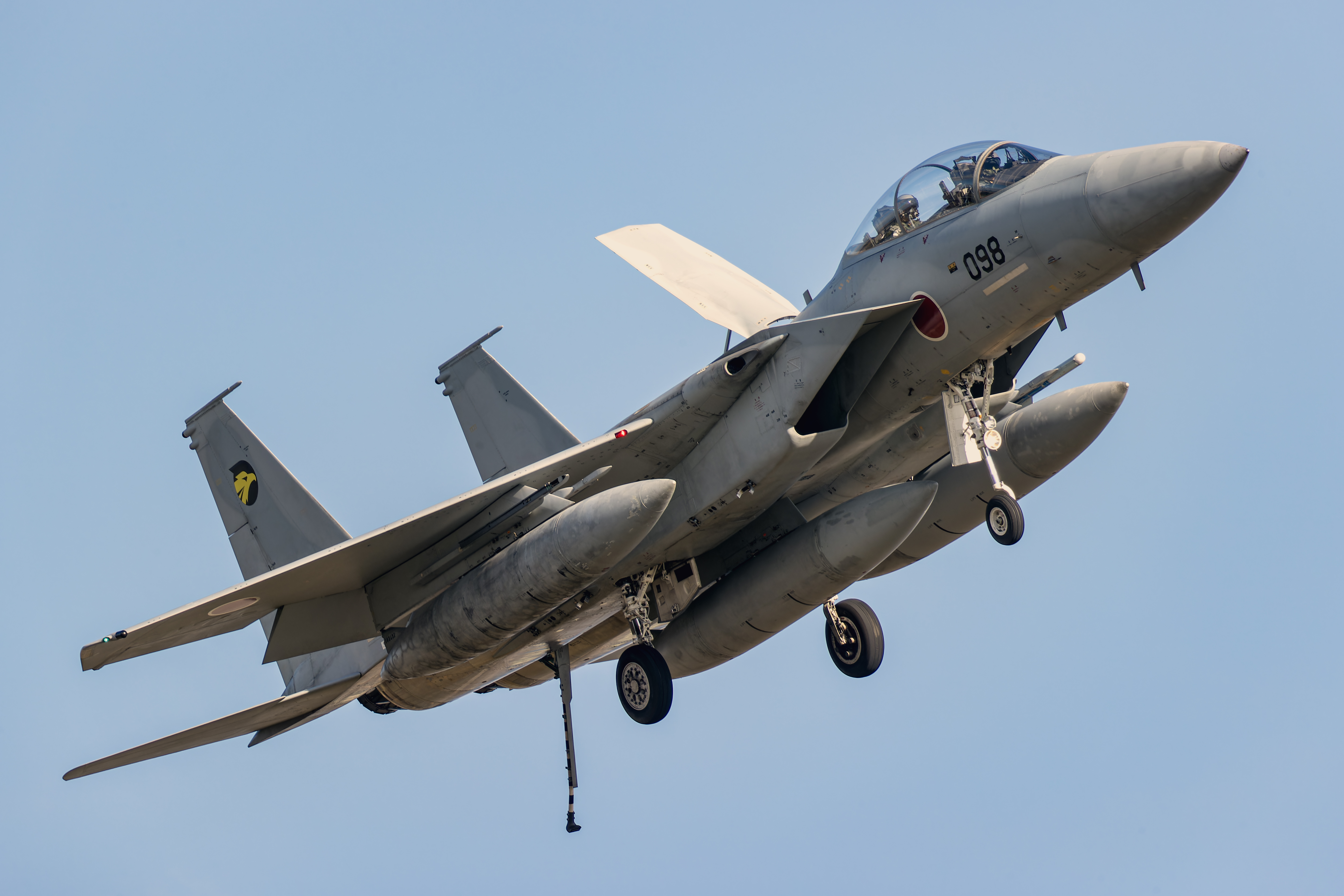 航空自衛隊松島基地 第306飛行隊の、F-15J要撃戦闘機